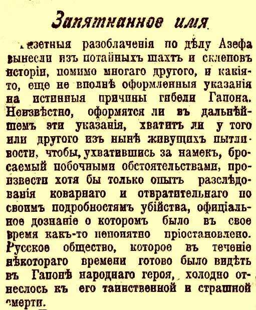 Фрагмент статьи Л. Я. Гуревич "Запятнанное имя" из газеты "Слово" по делу Георгия Гапона